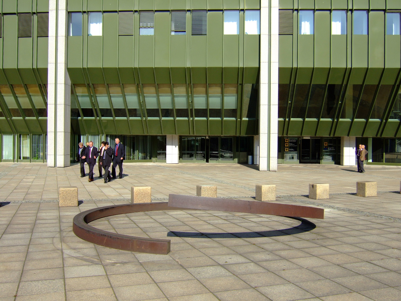 Alf Lechner: o.T. (1987) – Robert-Schuman-Platz in Bonn